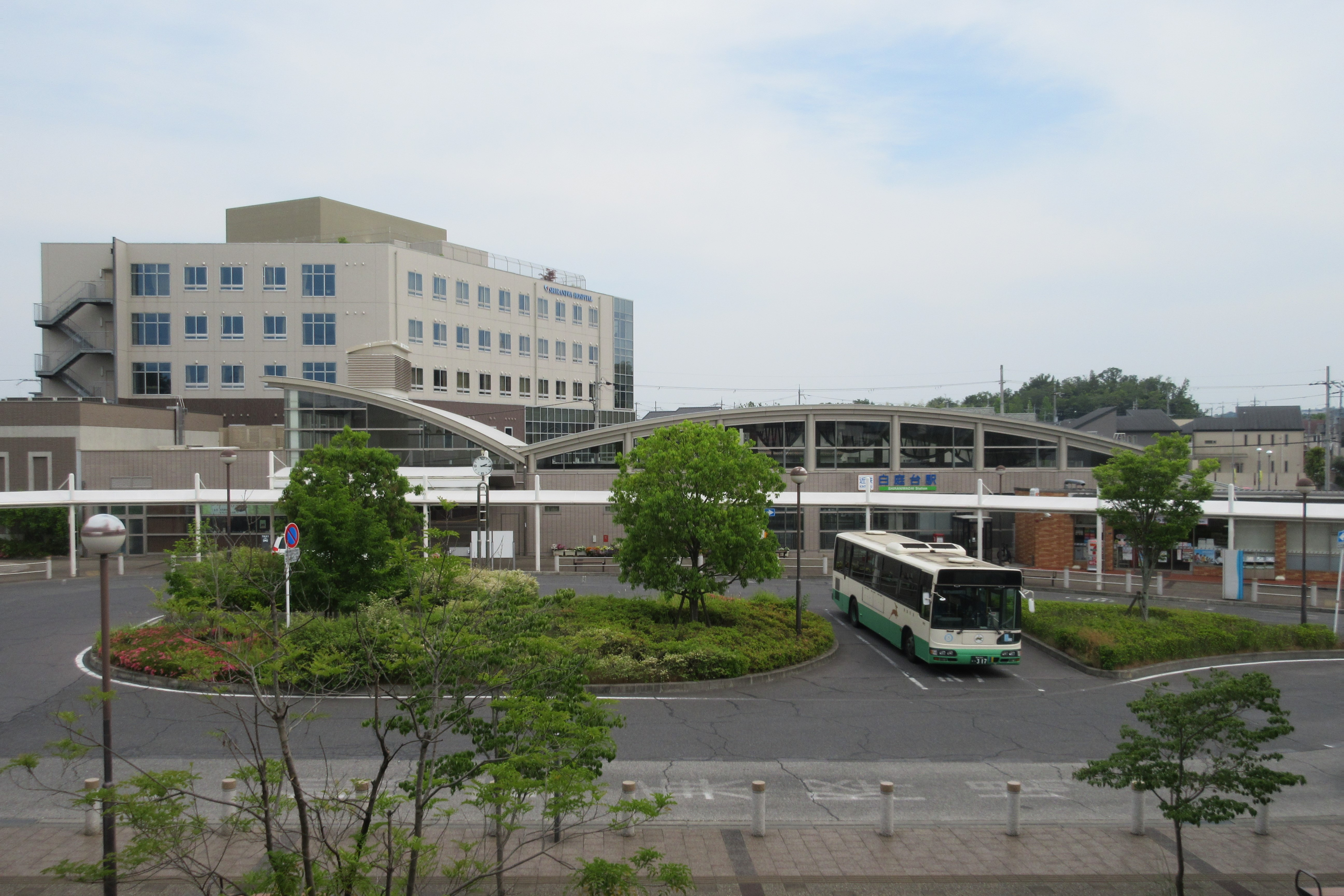 近鉄白庭台駅